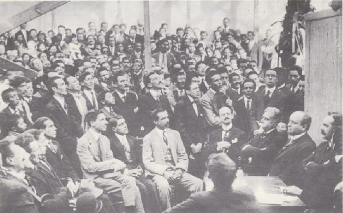 Firma del Acta de los Tres dobleces en 1919.